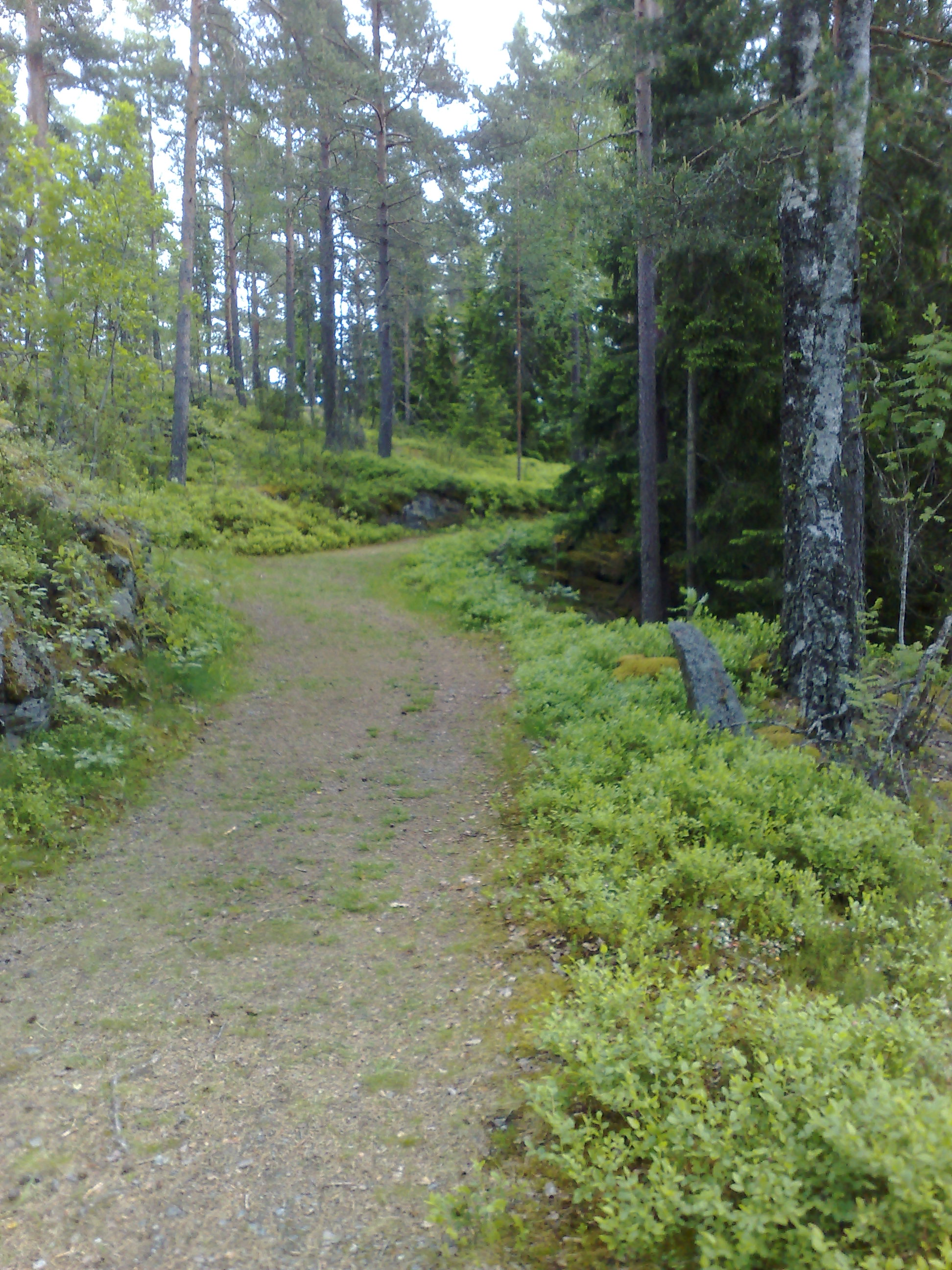 Batteriveien opp til Høgaas batteri. Nesten oppe i batteriet.